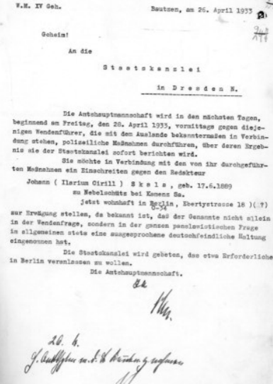 Документ „Вендског одељења” (W.M.): Државном канцелару у Дрездену од начелника бауценског округа. 26. април 1933. године